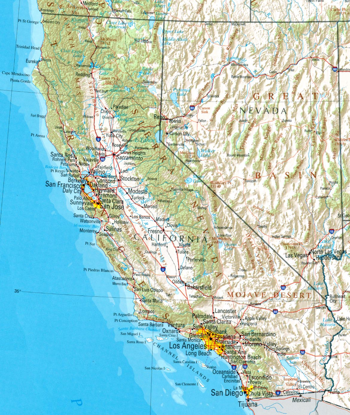 Referenzkarte des US-Bundesstaates Kalifornien